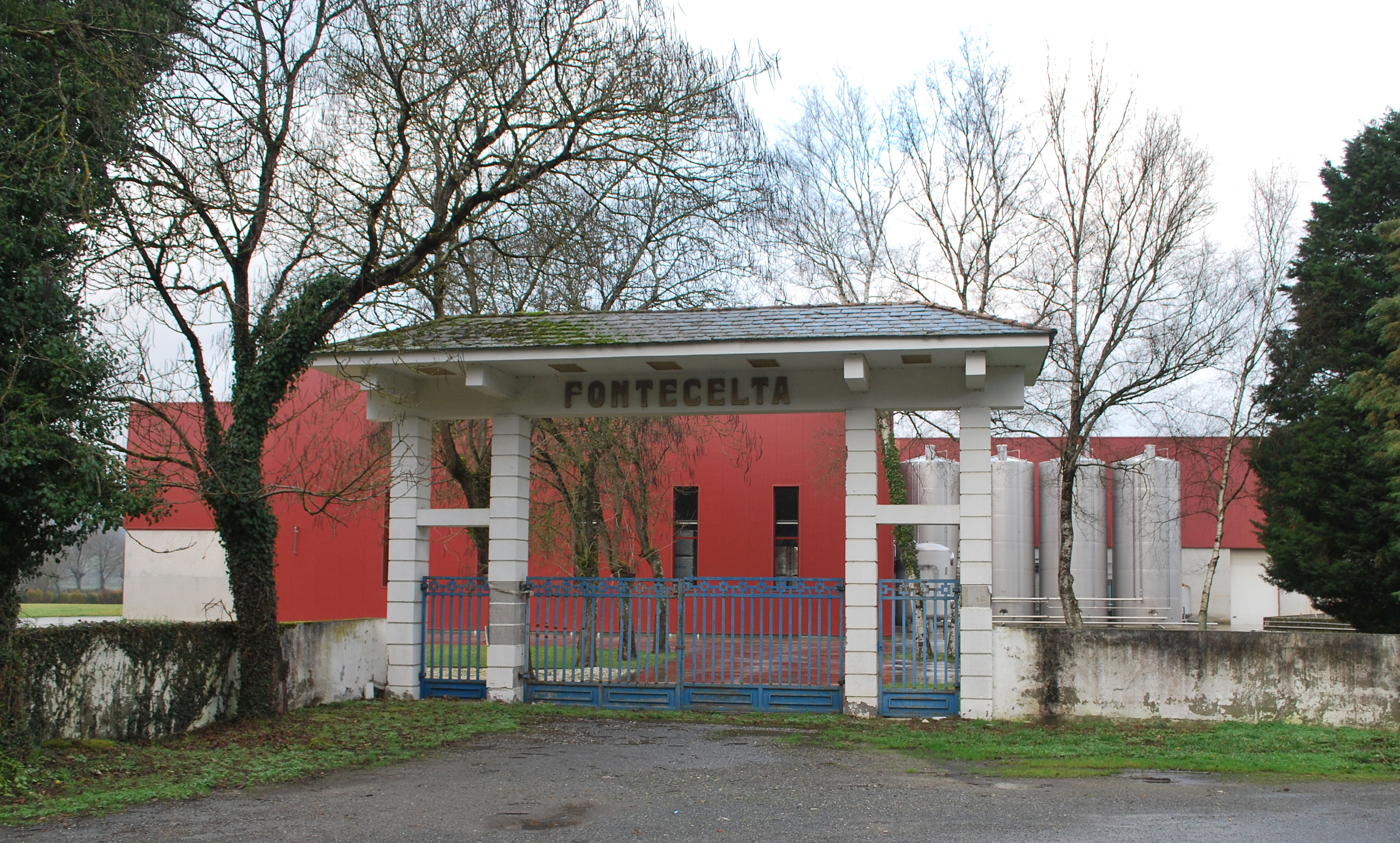 Entrada a Fontecelta en Sarria, Lugo